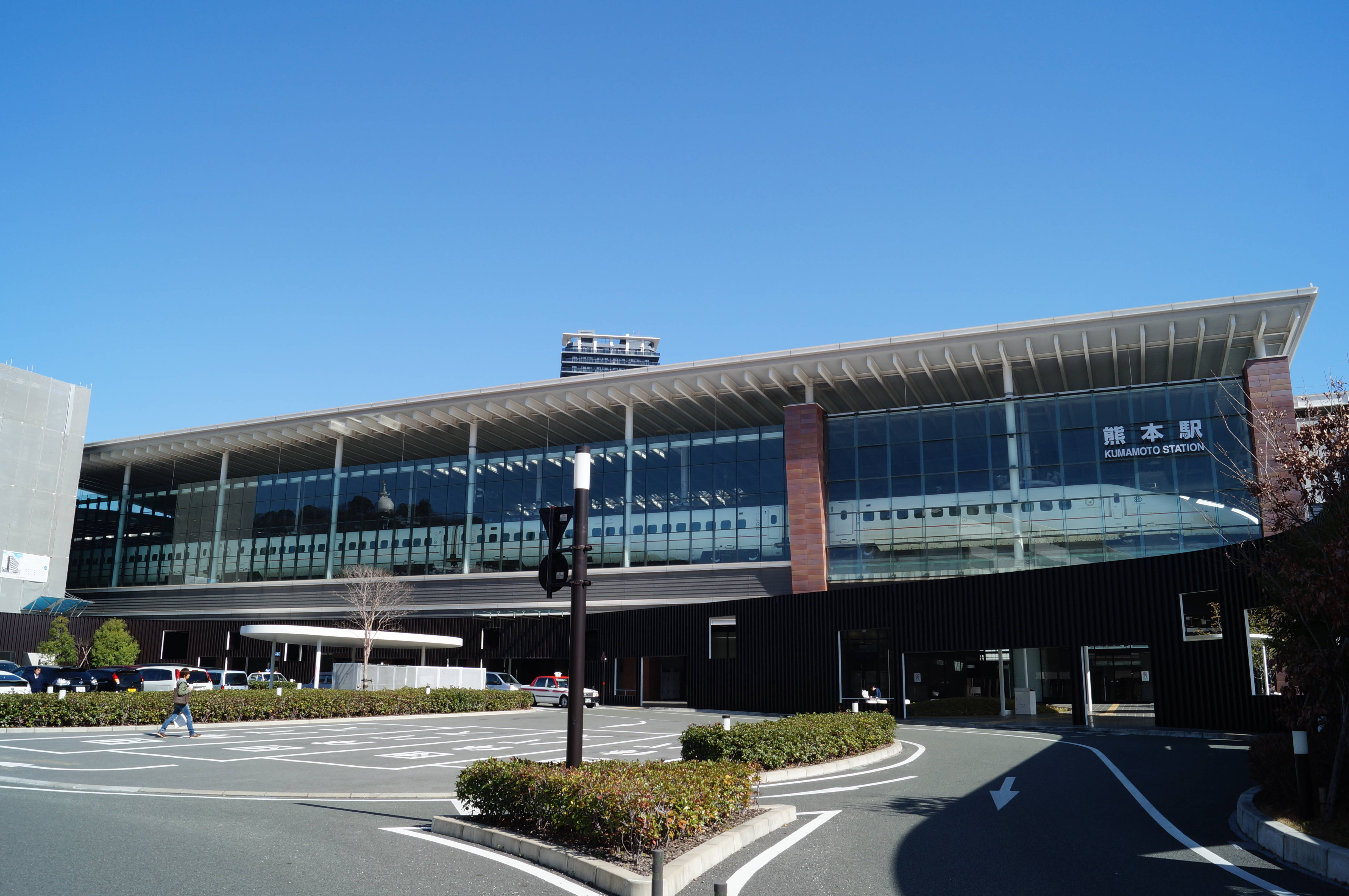 熊本駅 新幹線口 駅前広場